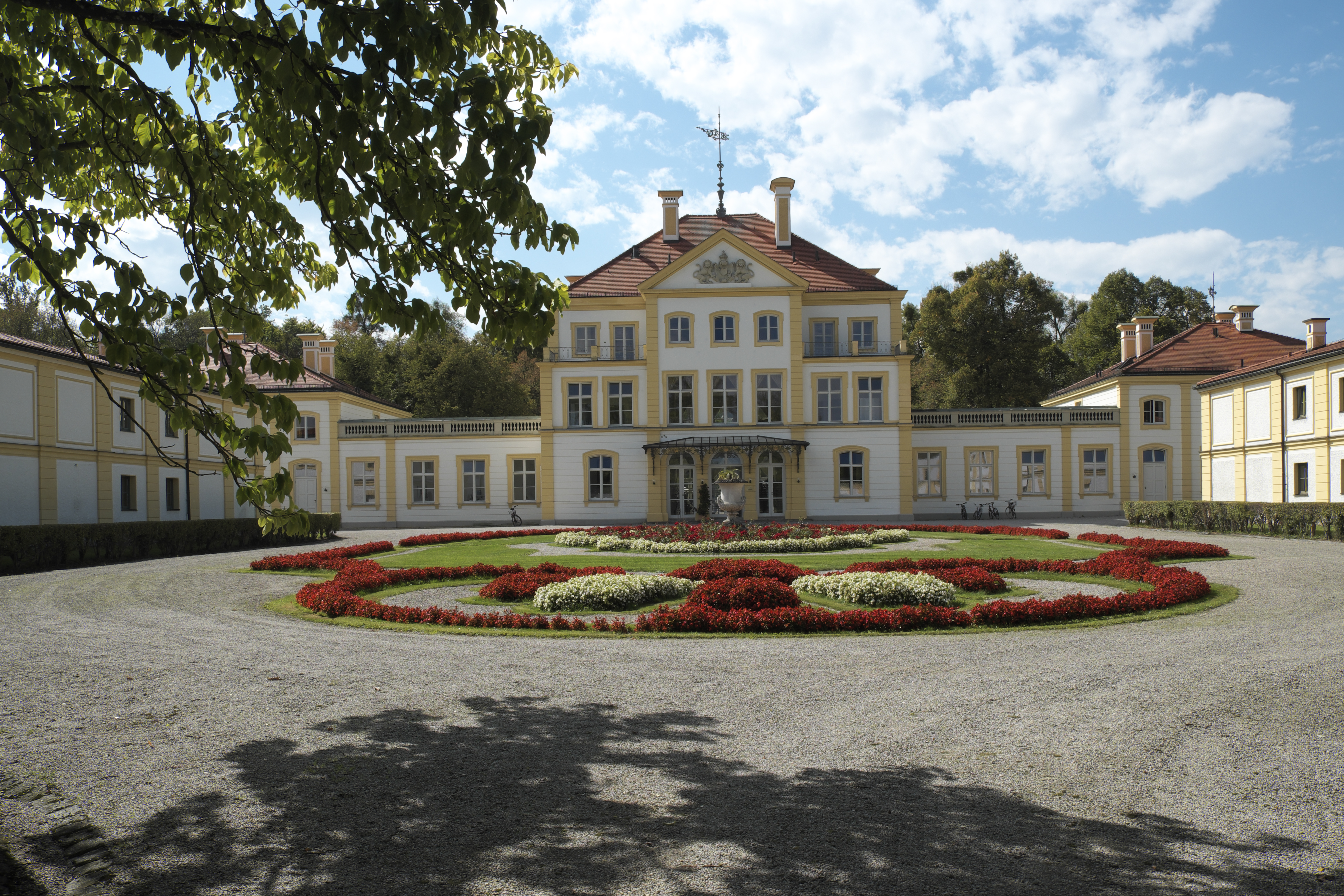 Schloss Fürstenried, heute Exerzitienhaus des Bistums München und Freising, im Stadtteil Forstenried im Stadtbezirk Thalkirchen-Obersendling-Forstenried-Fürstenried-Solln in München (Bayern/Deutschland)